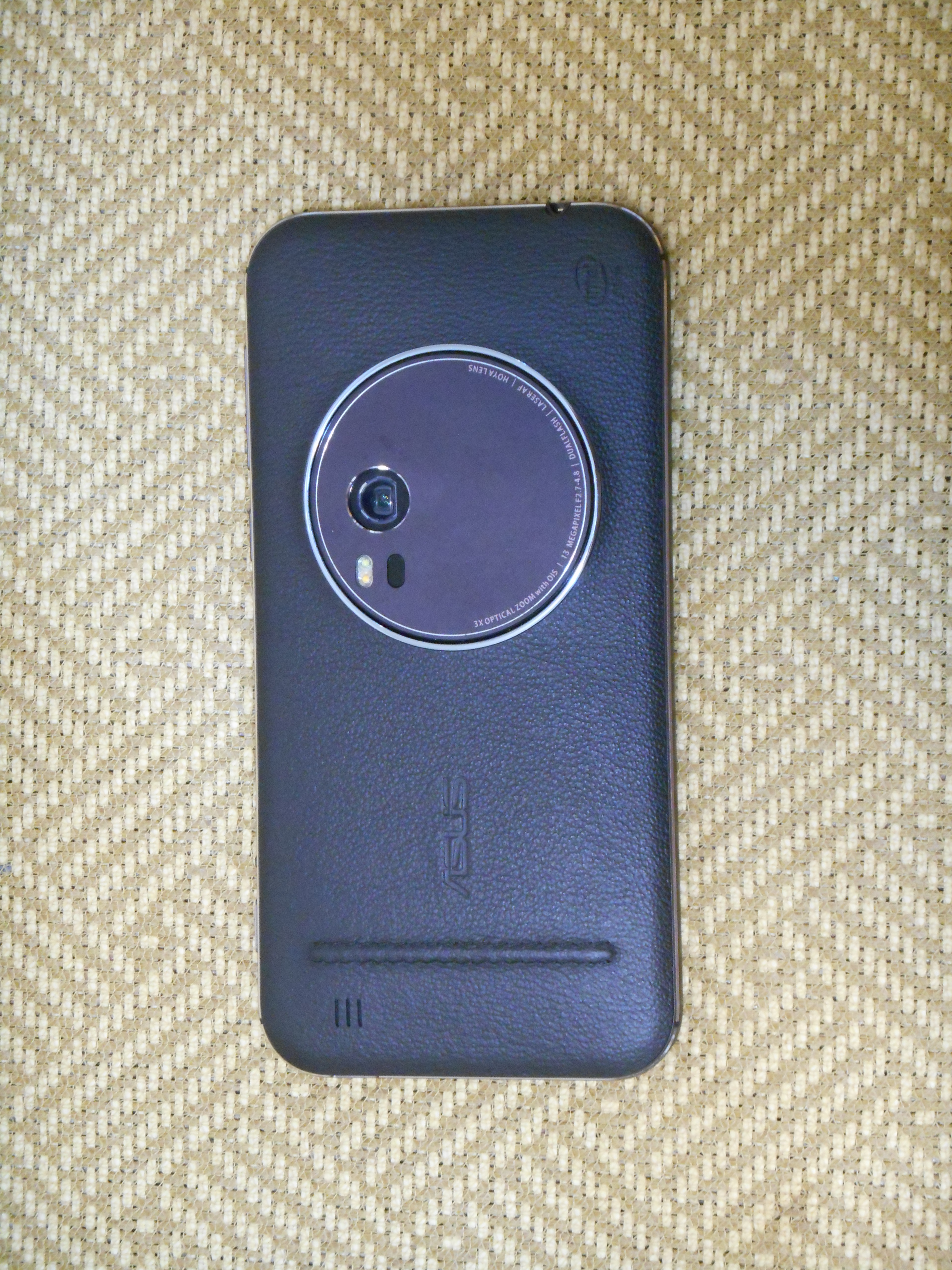 asus zenfone zoom's back